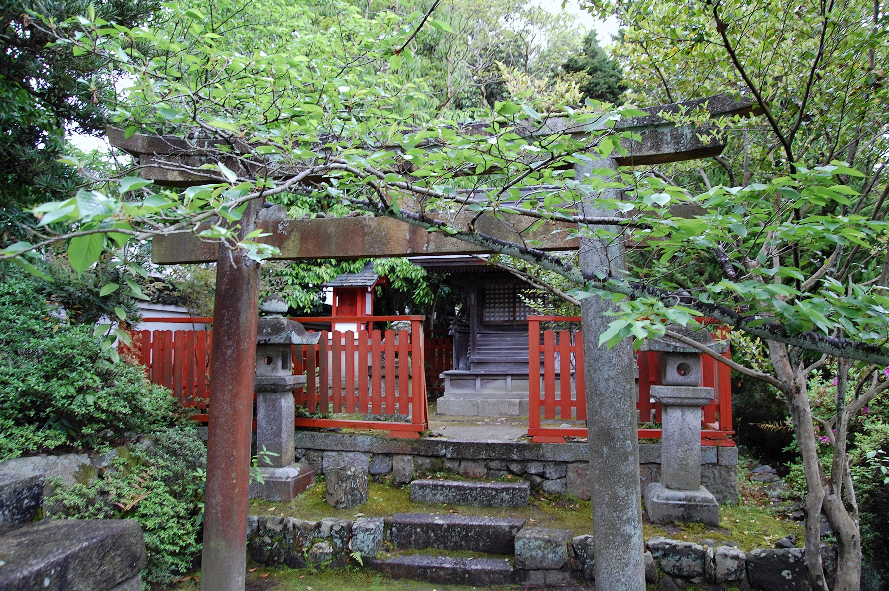 京都 府登録文化財穴太寺鎮守堂